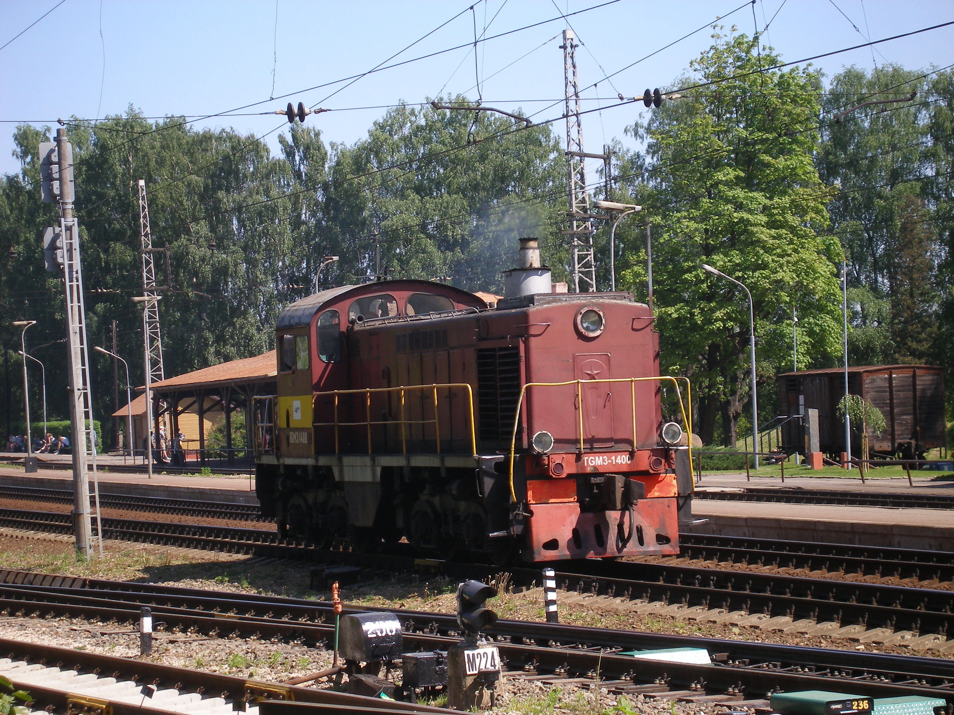 Dīzeļlokomotīve TGM3-1400 Torņakalna stacijā.